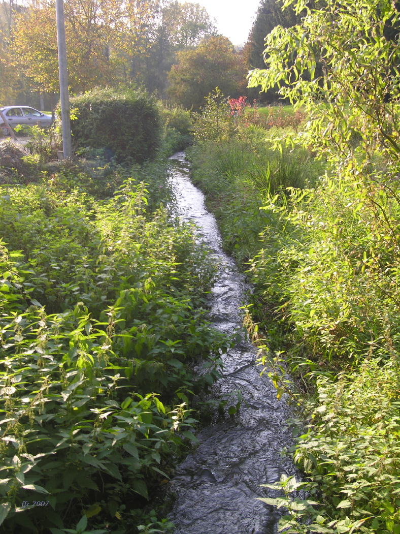 El riu Bel a Val-Dieu poc abans el conflent amb el Berwijn